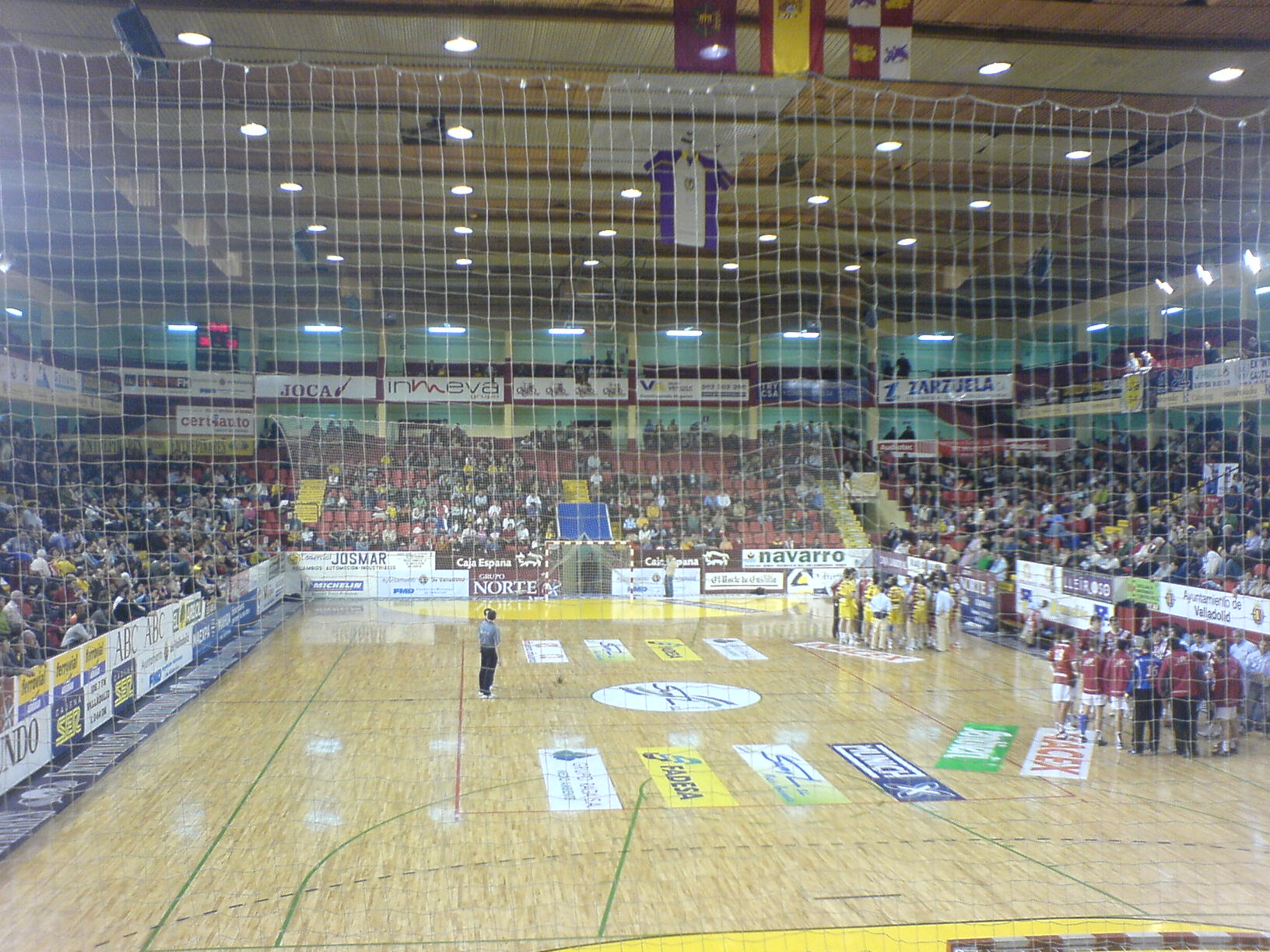 Polideportivo Huerta del Rey durante un partido de la Liga ASOBAL de la temporada 2006/07 frente al Darien Logroño.